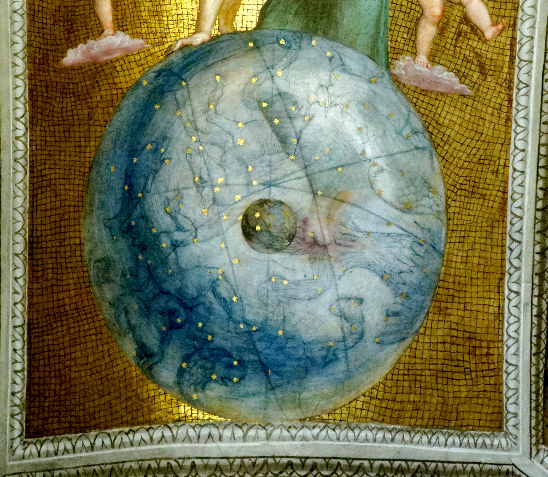 Primo moto o L'Astronomia, affresco di Raffaello (1508): dettaglio del globo celeste, su cui è rappresentata la terra e la configurazione del cielo al 31 ottobre 1503, giorno dell'elezione di papa Giulio II al soglio di San Pietro, tre ore dopo il tramonto